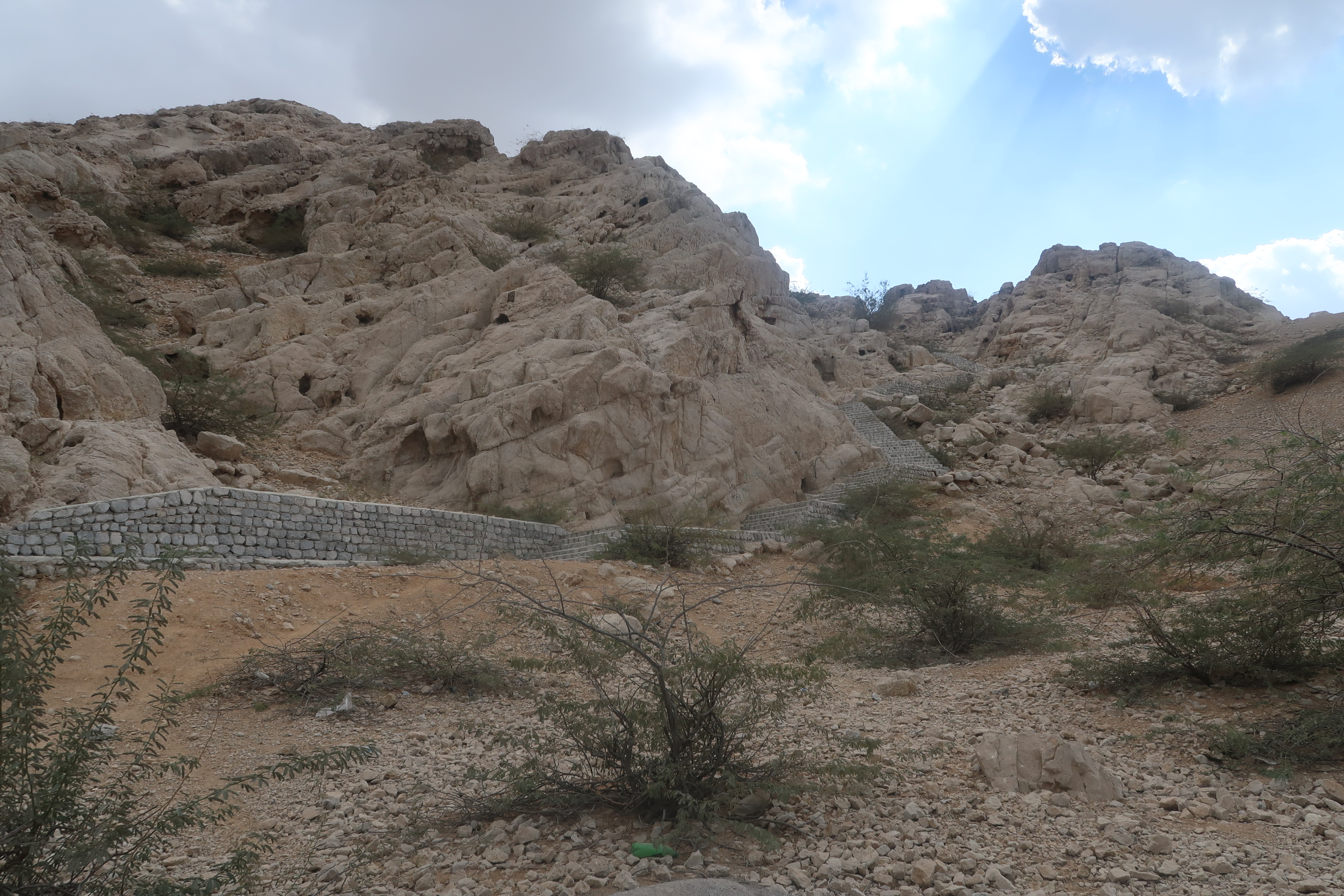 صورة للدرج الذي تم بناؤه مؤخراً الموصل لقصر الزباء في قرية شمل في رأس الخيمة